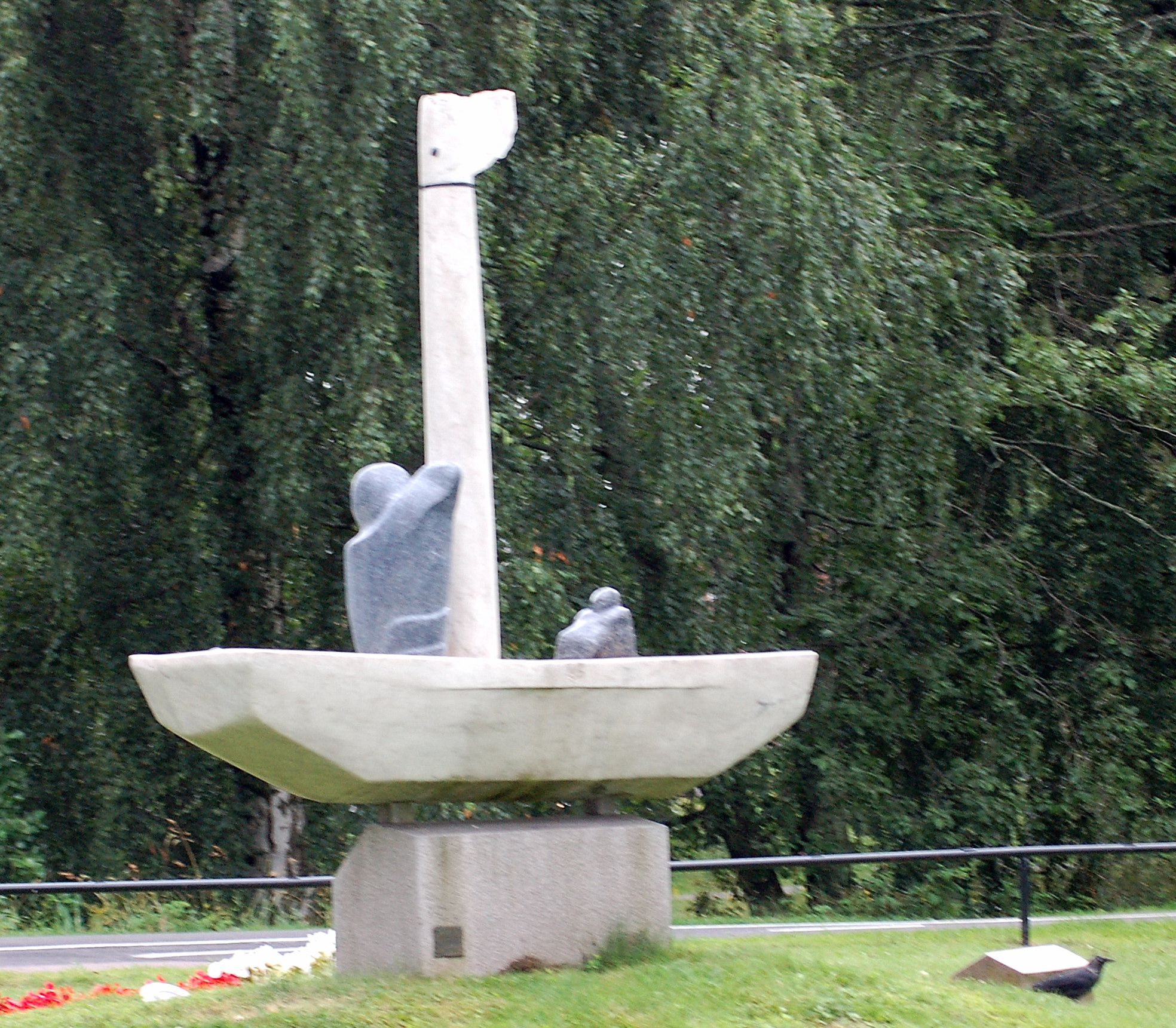 "Farkost" av Börje Wahlström uförd i glanshammarsmarmor, bohusgranit och norsk labrador 1992, konstverket är plaserat i Hagaborg.